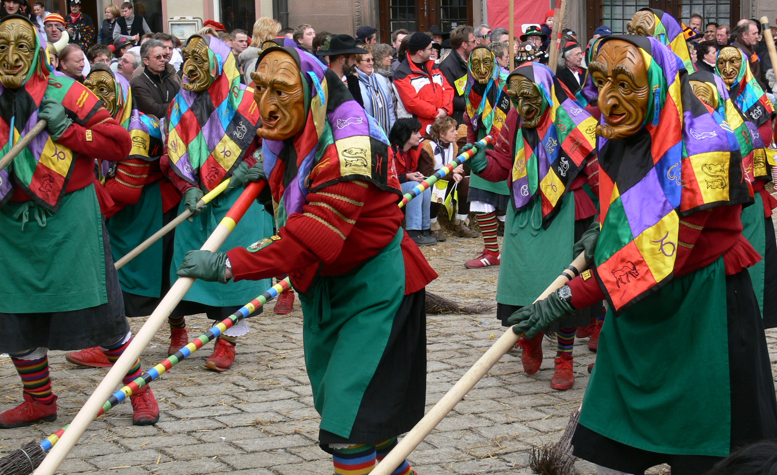 Narrenzunft Aulendorf, Figur: Eckhexe Veranstaltung: Narrensprung beim Narrentreffen Meßkirch 2006